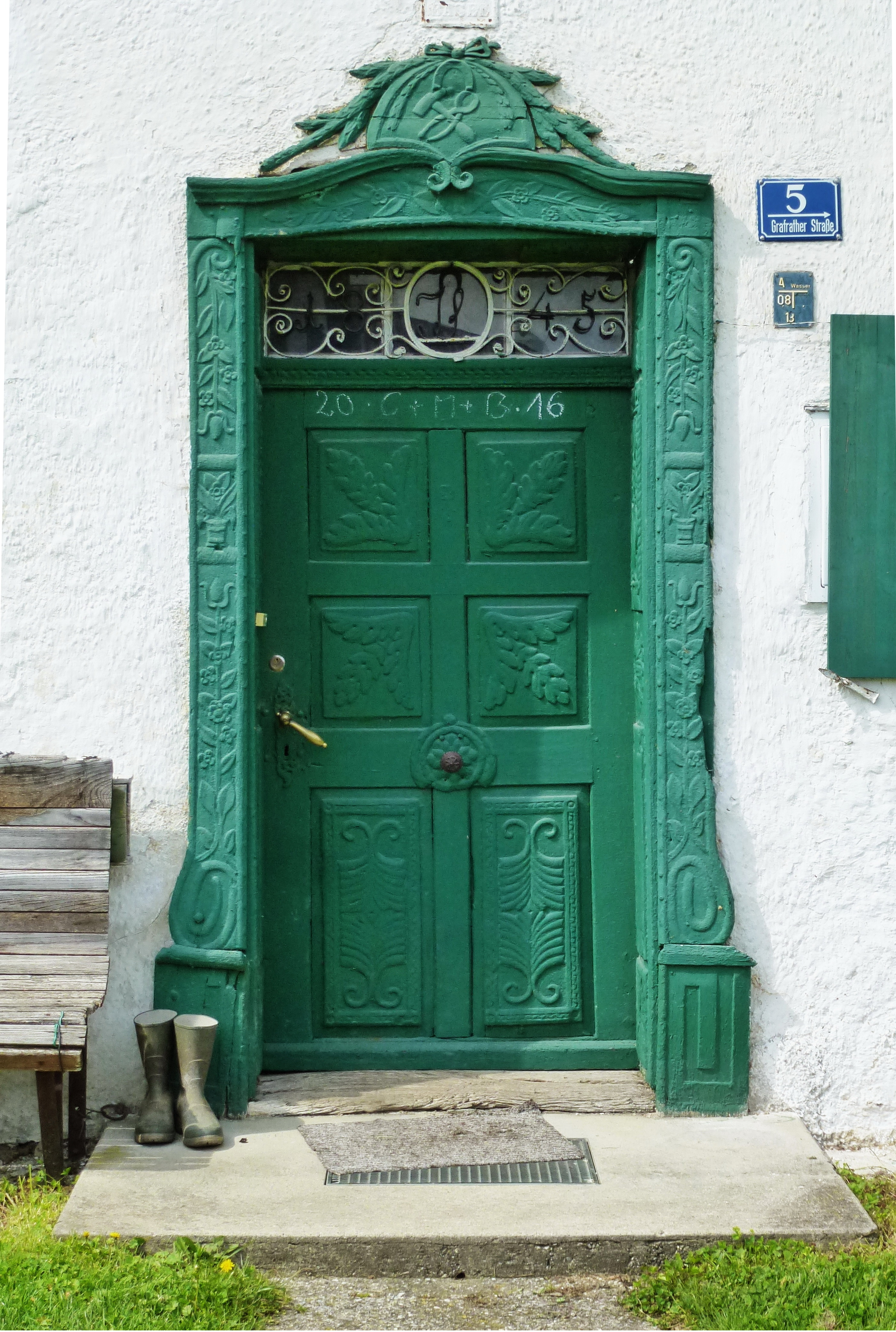 Kottgeisering, Grafrather Str. 5: Holztür und Türstock mit zahlreichen Schnitzereien. Im schmiedeeisernen Dekor im Tür-Oberlicht stehen die Jahreszahl 1845 und die Initialen IS. Im wappenartigen Holzaufsatz oberhalb der Tür sind ein Hufeisen sowie eine Schmiedezange und ein Hammer geschnitzt.